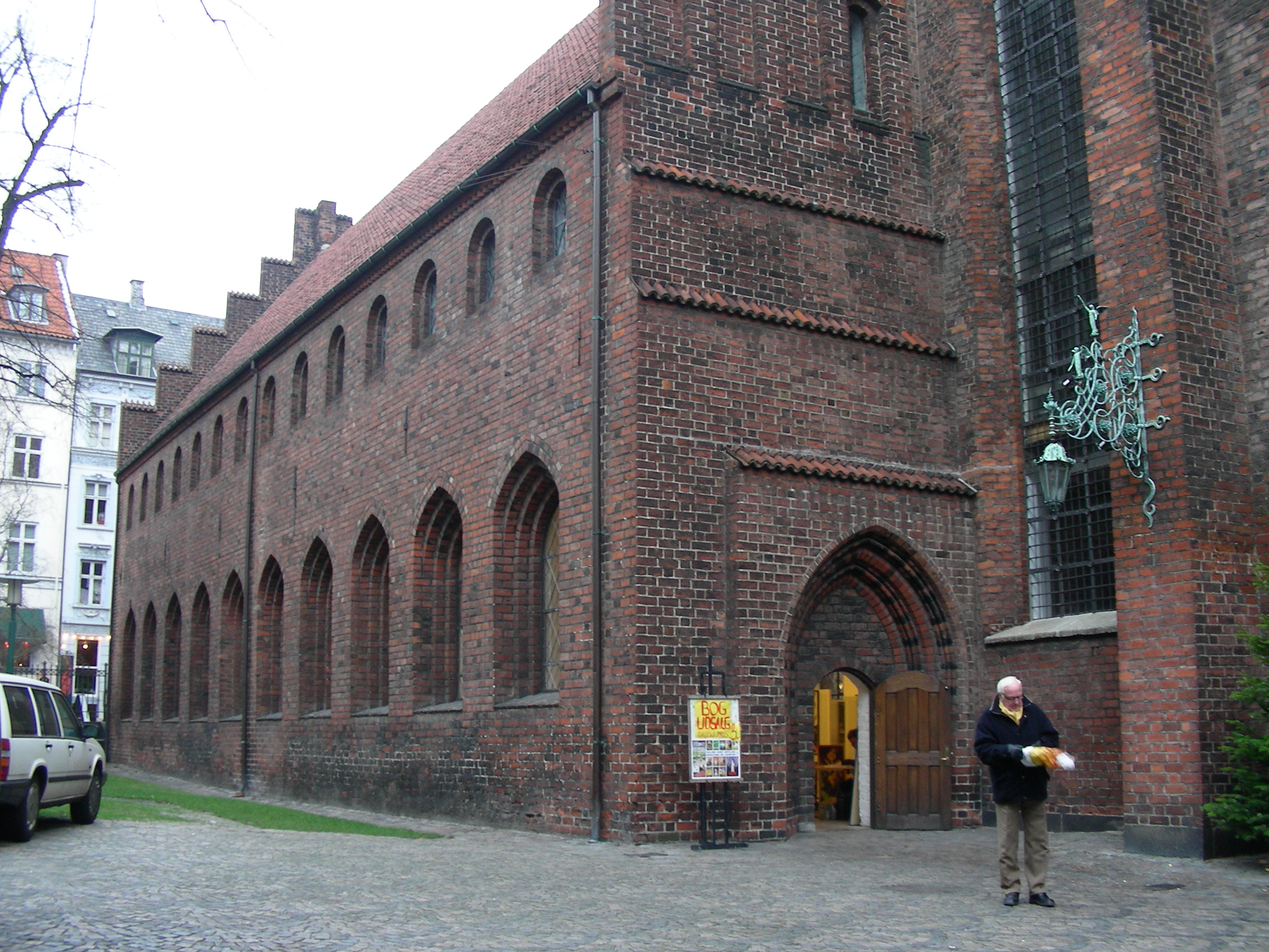 Helligåndskirken, Copenhagen, Denmark. Entrance to Helligaandshuset